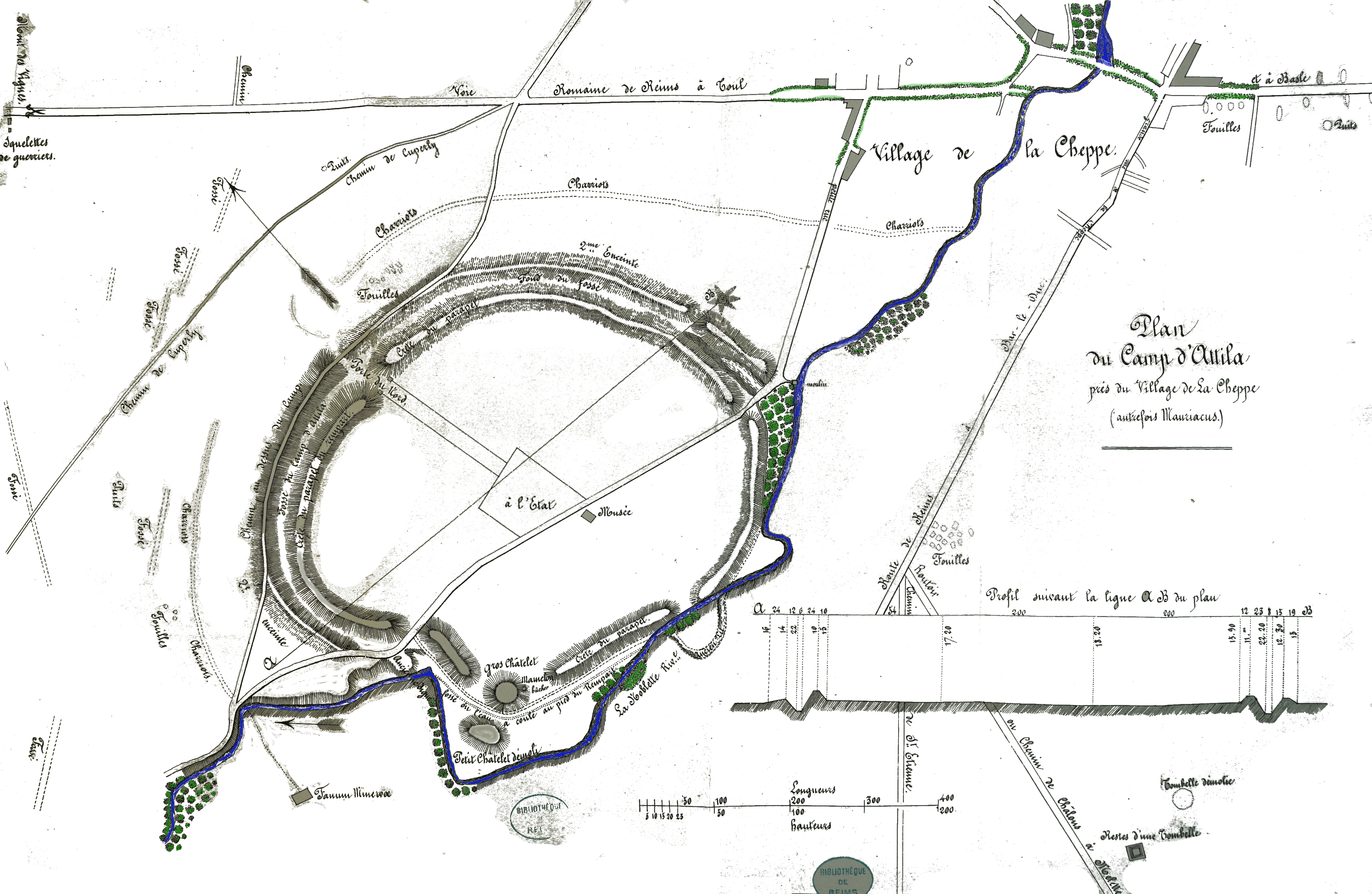 dessin du XIXe siècle.